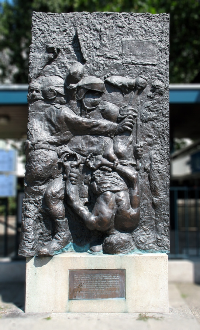 "Der Tod des Demonstranten" von Alfred Hrdlicka. Gedenkrelief für Benno Ohnesorg vor der Deutschen Oper Berlin.